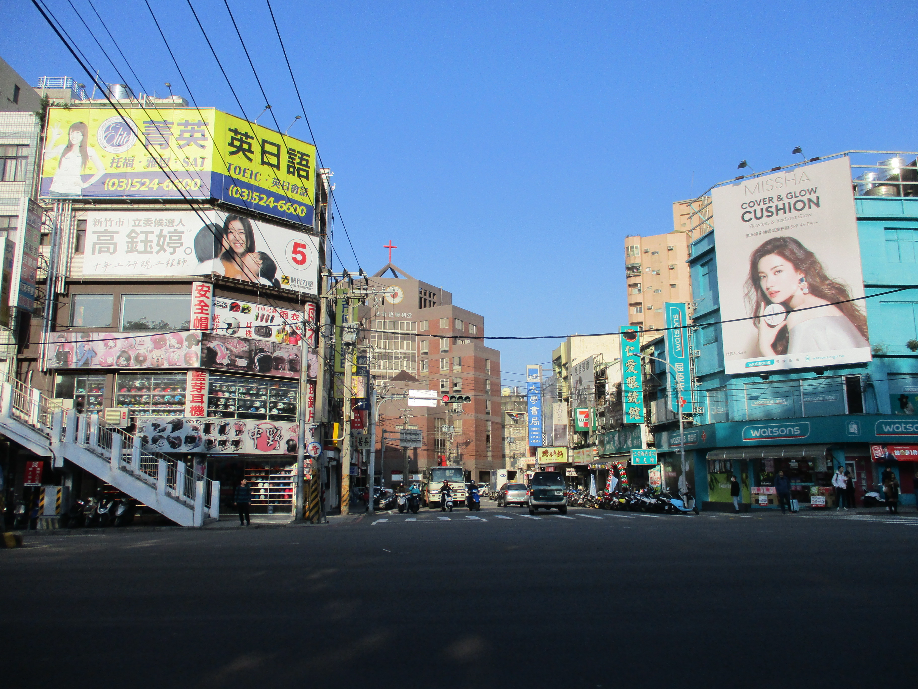 從光復路看清大夜市，同時為建功路與光復路二段交叉路口